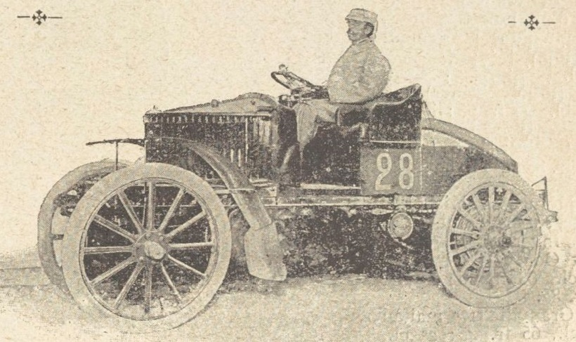 Le baron Adrien de Turckheim au Paris-Berlin 1901, sur De Dietrich - La Vie au Grand Air n°151 du 4 aoêt 1901, p.451